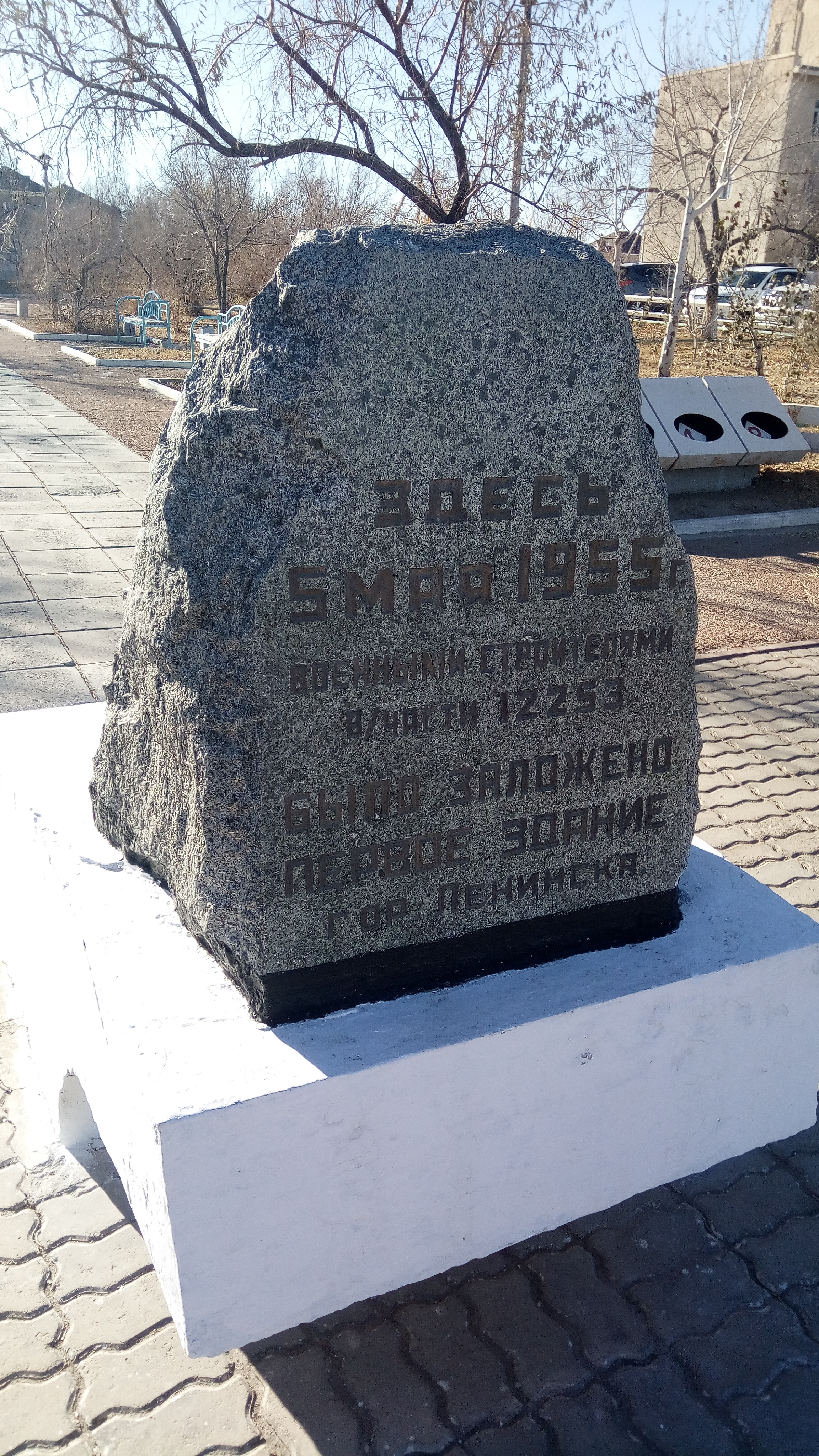 Камень на месте где было заложено первое здание (Байконур)